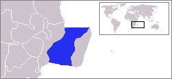 Location of Mozambique Channel